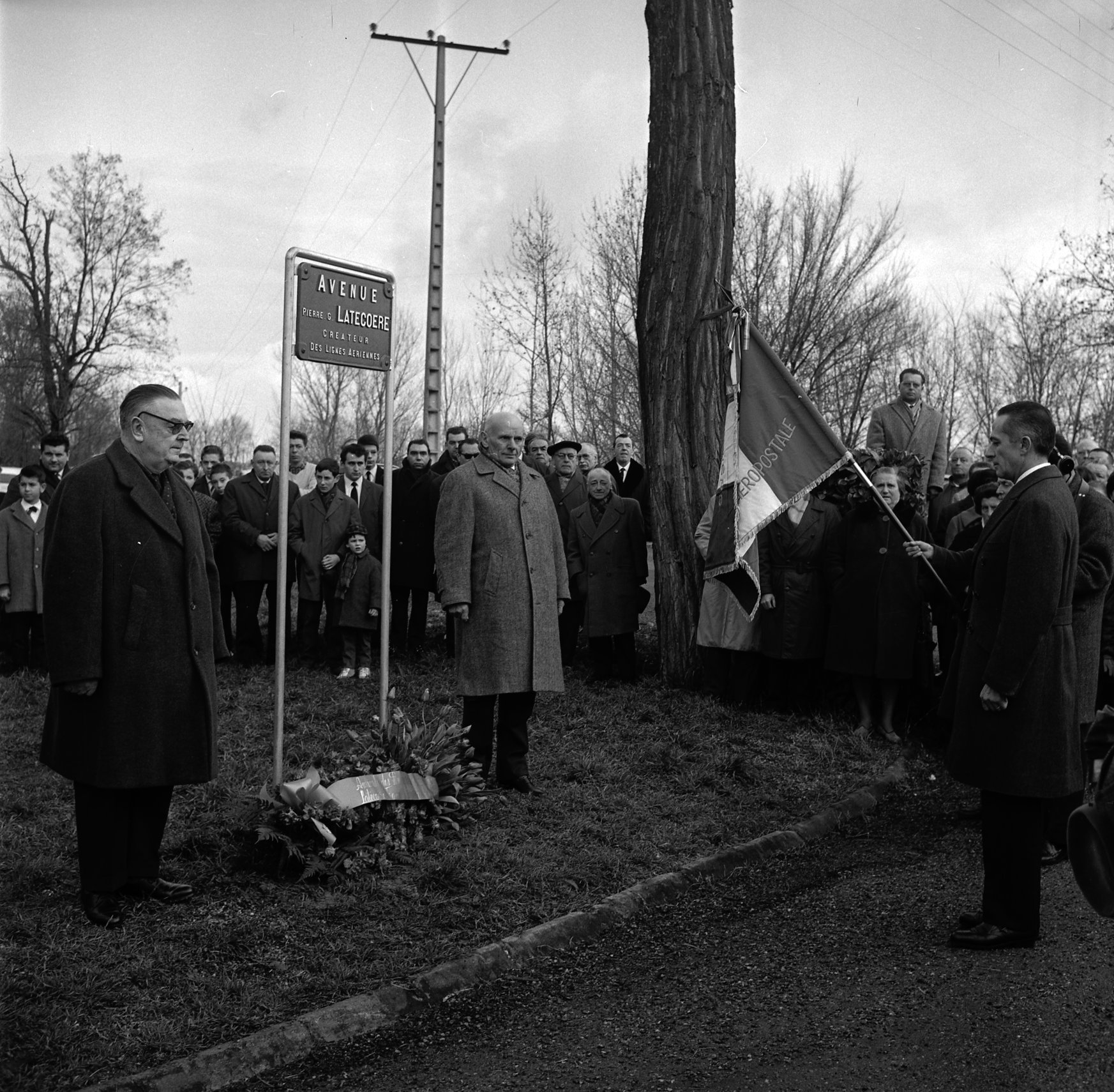 Avenue Latécoère (Toulouse sud). 14 février 1965. Vue d'ensemble de deux hommes posant à côté du panneau indiquant l'avenue, gerbe de fleurs au pied du panneau : face à eux vue de profil du député Jacques Maziol ; drapeau militaire. Cliché pris lors de l'inauguration de l'avenue dénommée Pierre Georges Latécoère.